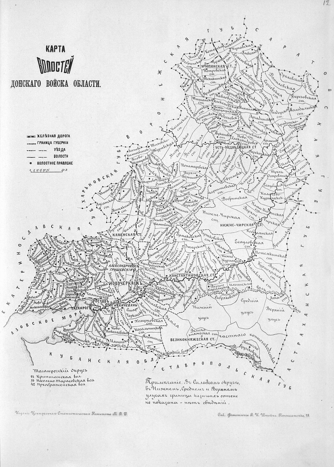 Карта волостей Области Войска Донского